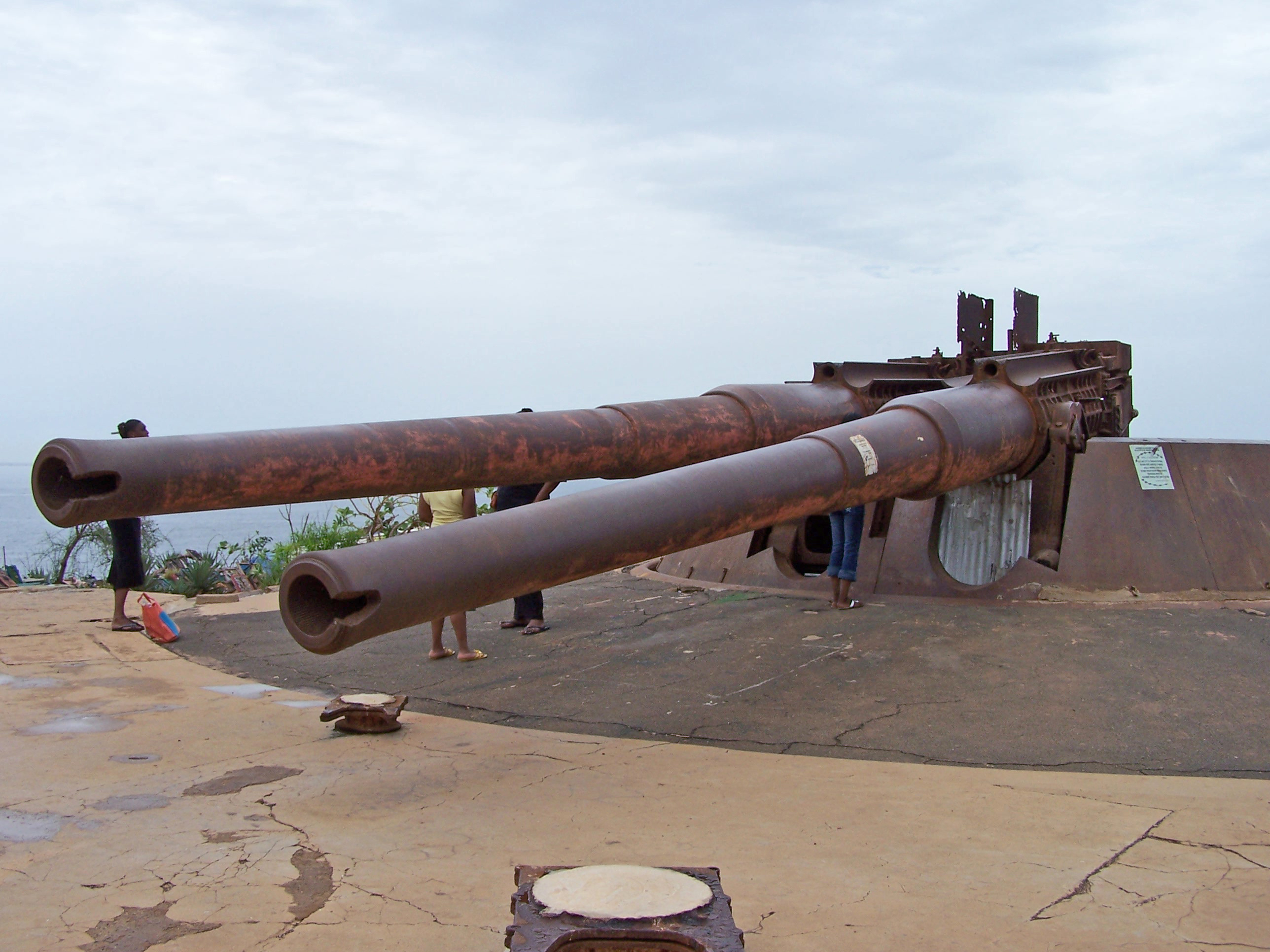 Gorée, Le Castel : cannon near Dakar, Senegal